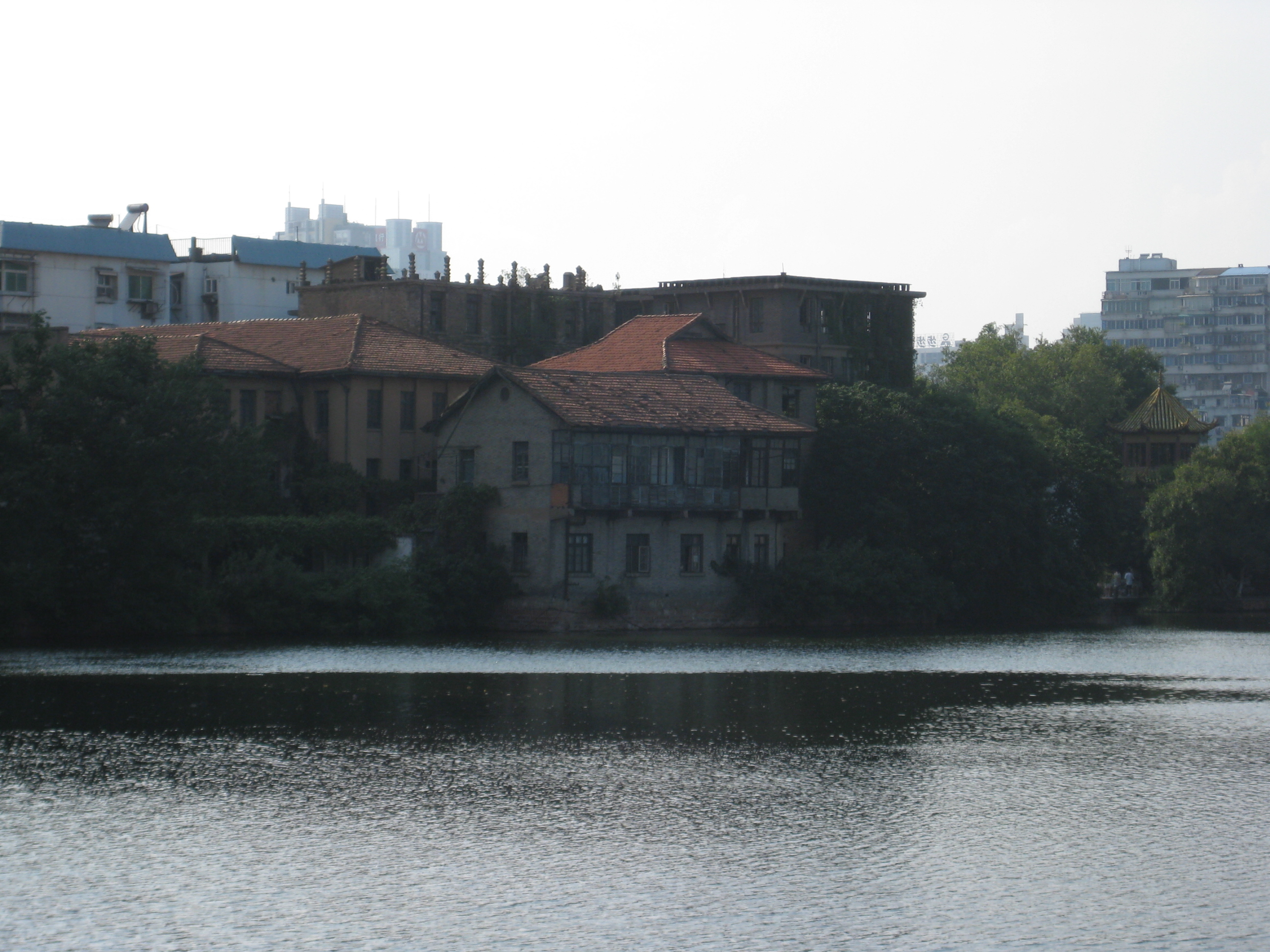 江西省图书馆旧馆，前南昌行营